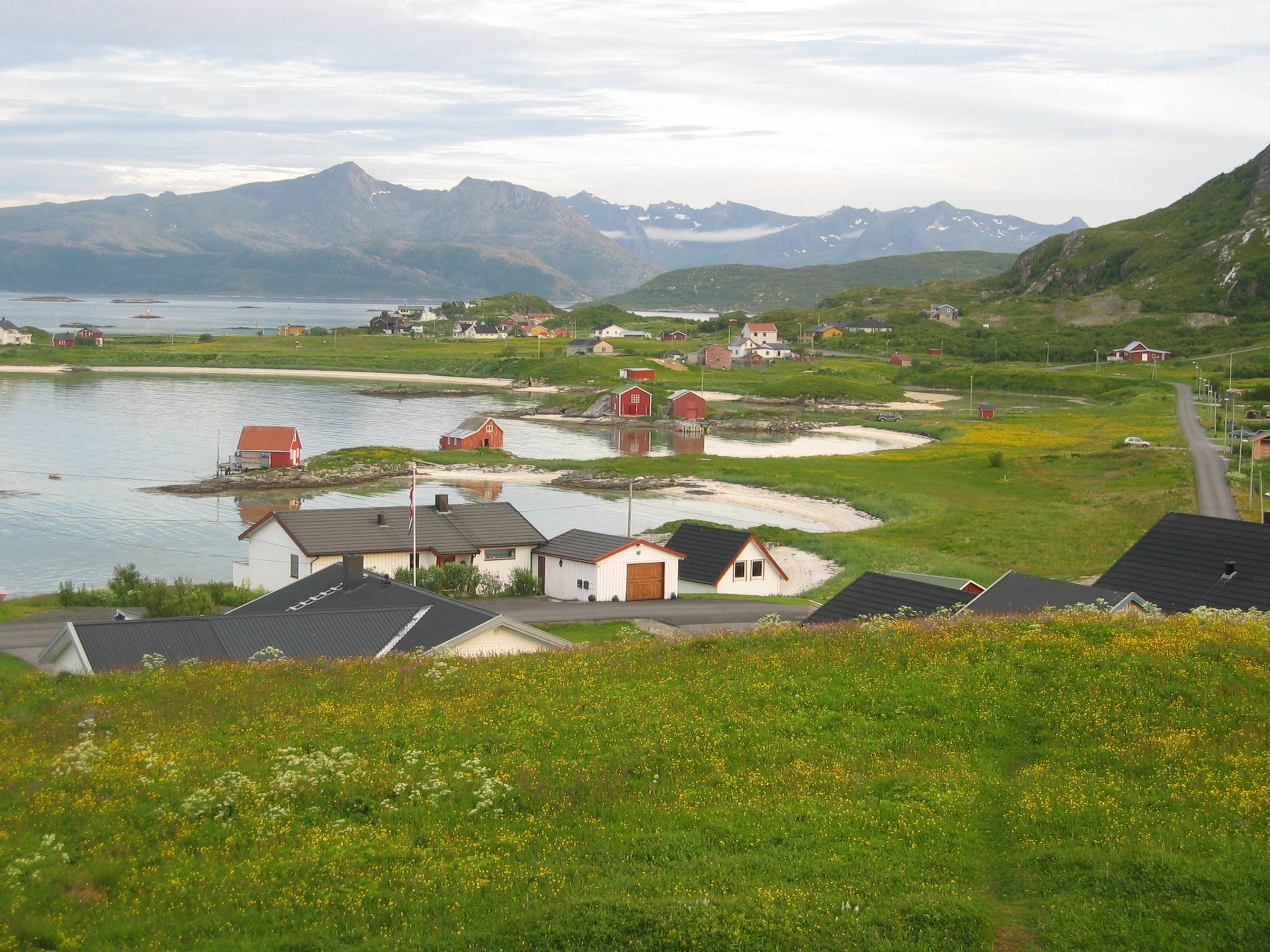 Sommarøy med utsikt sørover.